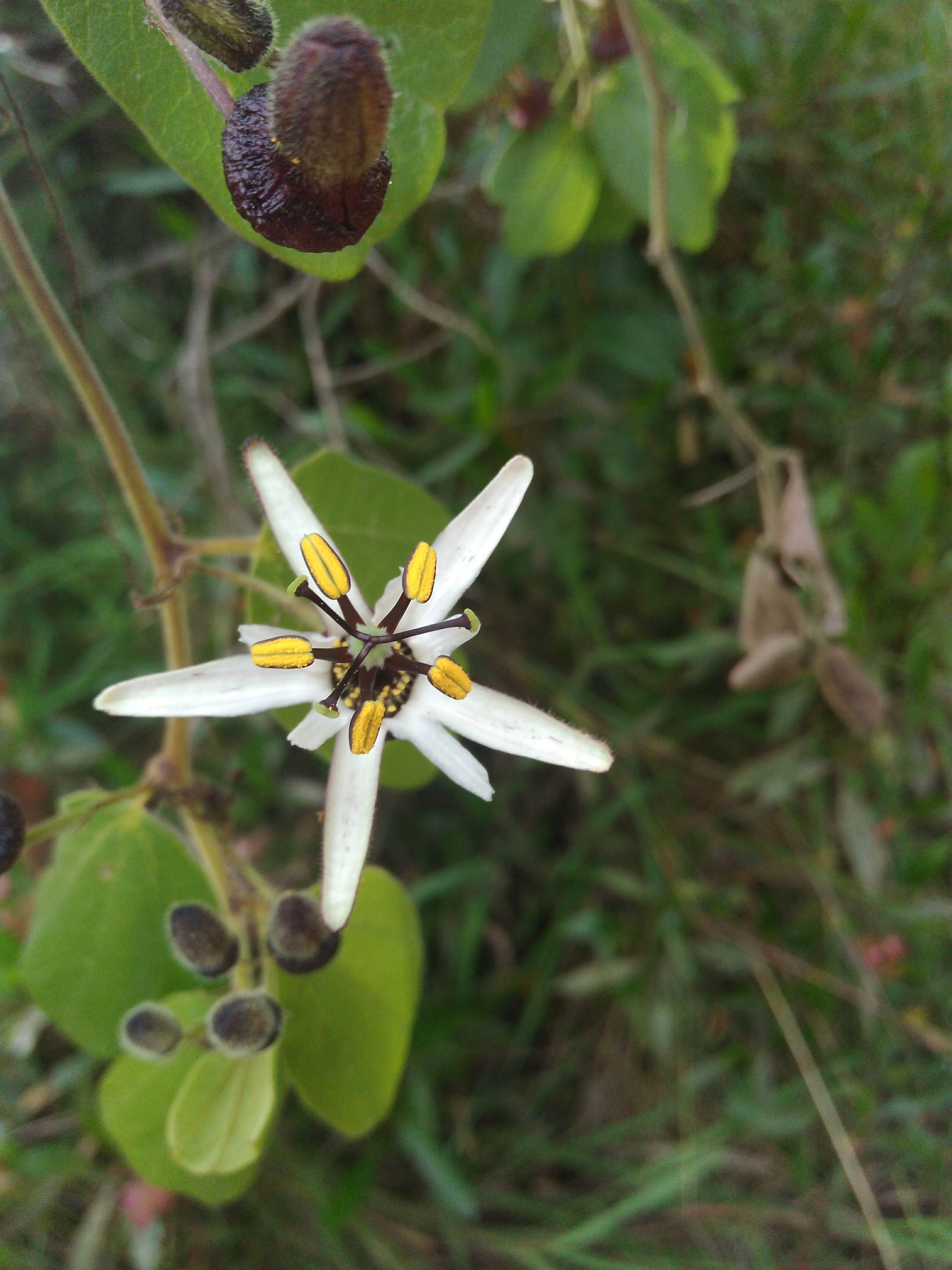 Flor de Passiflora bogotensis